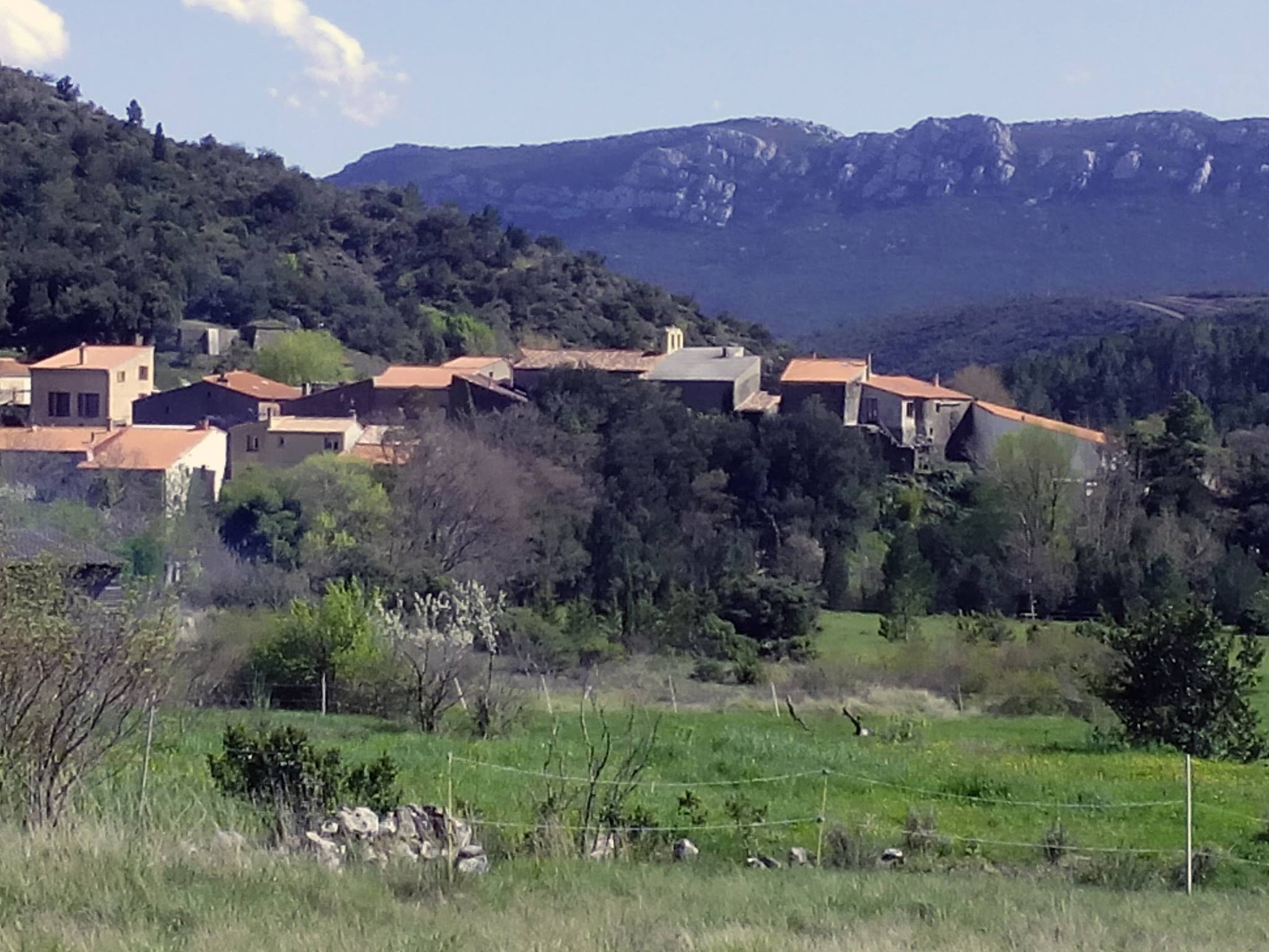 Vue générale de Prugnanes